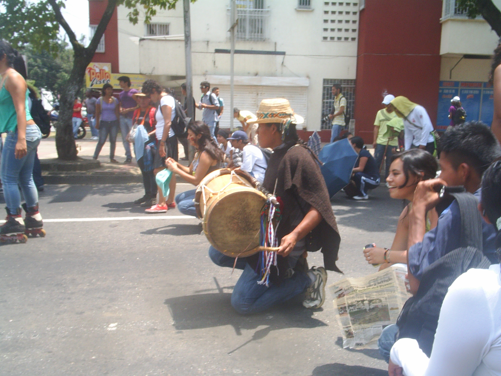 Tamborilero indígena durante la marcha